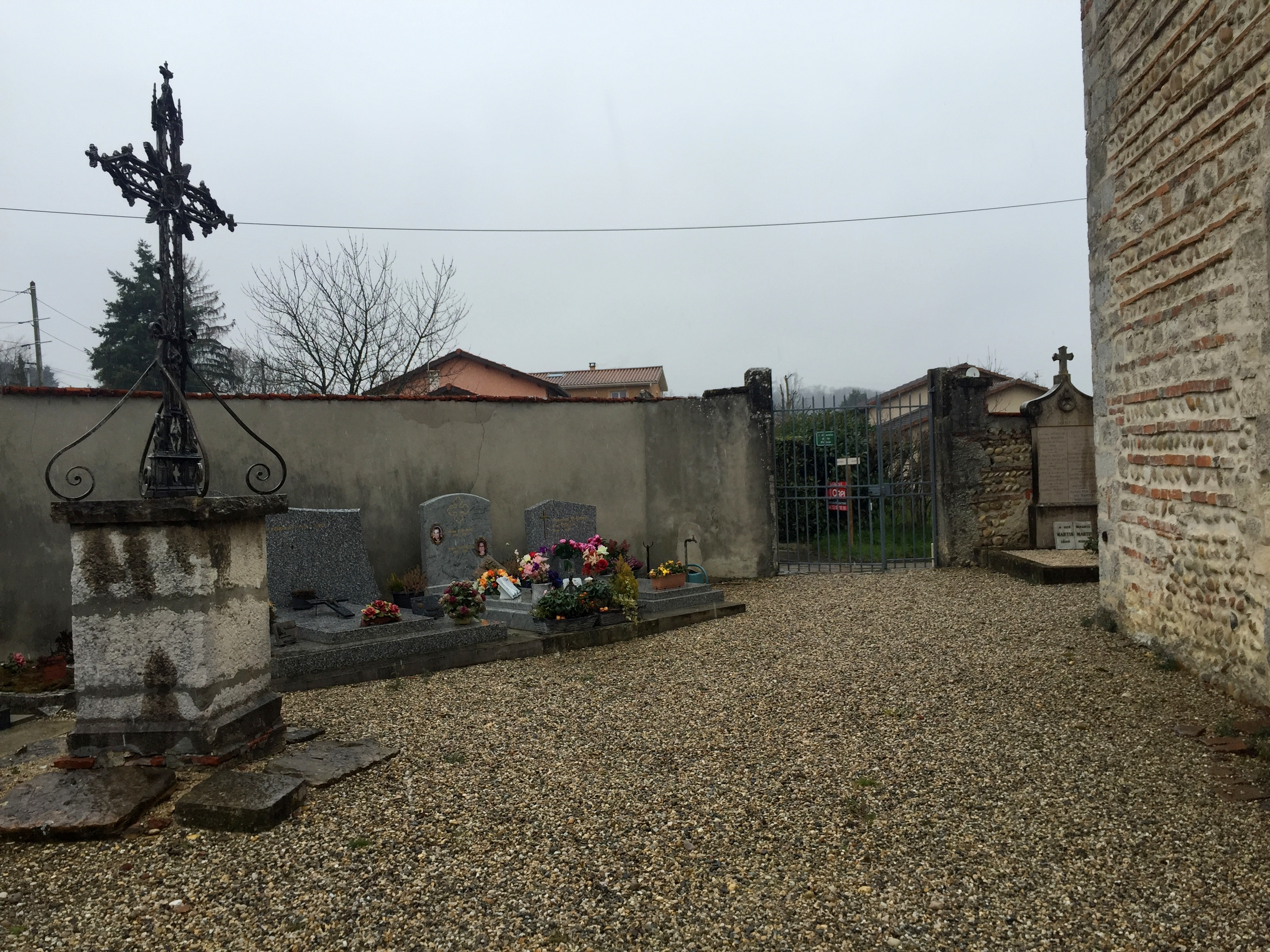 Image de Jailleux, Montluel, Ain, France..